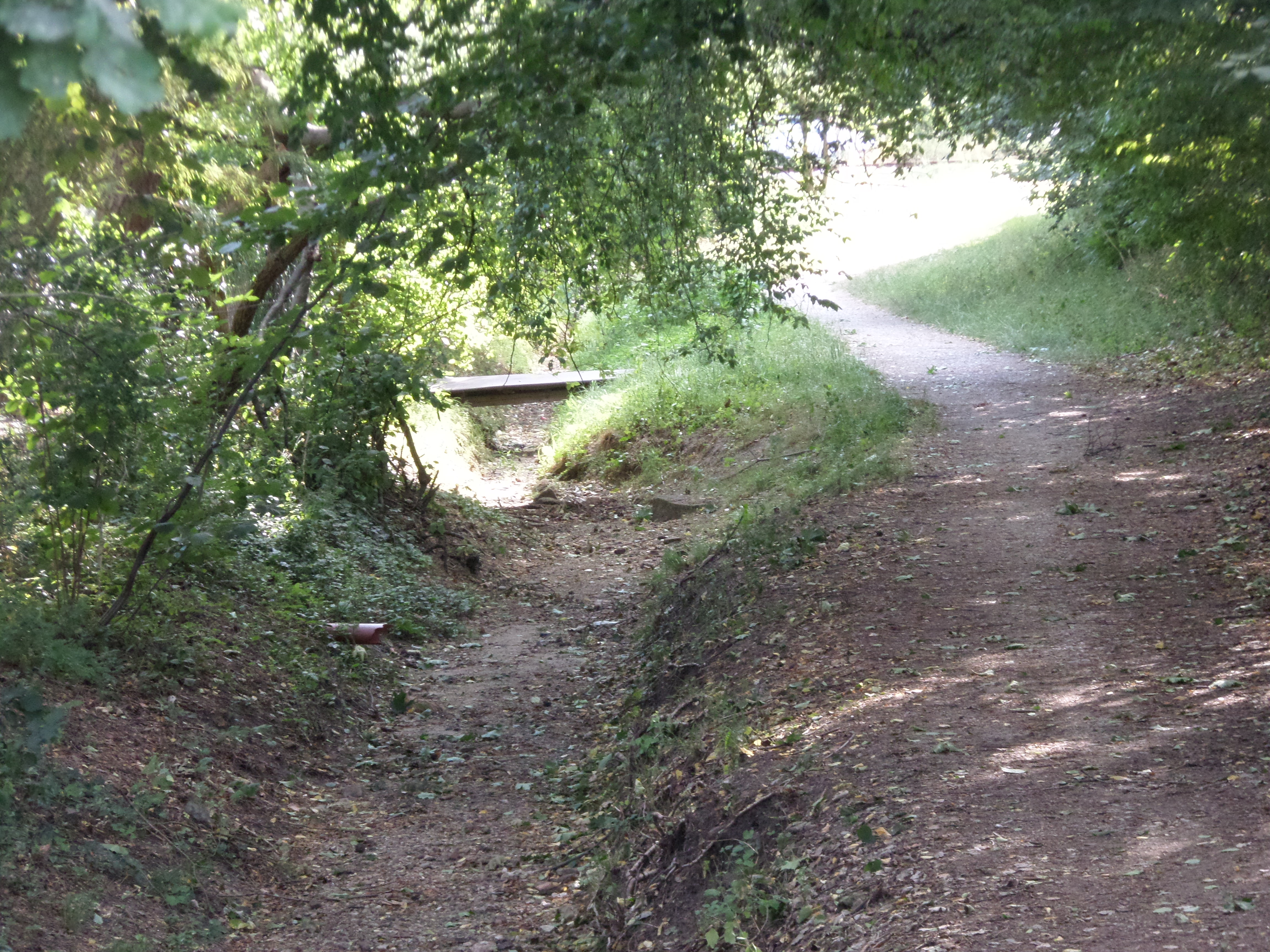 Hirschsprunggraben an der Hofer Str. Juli 2015